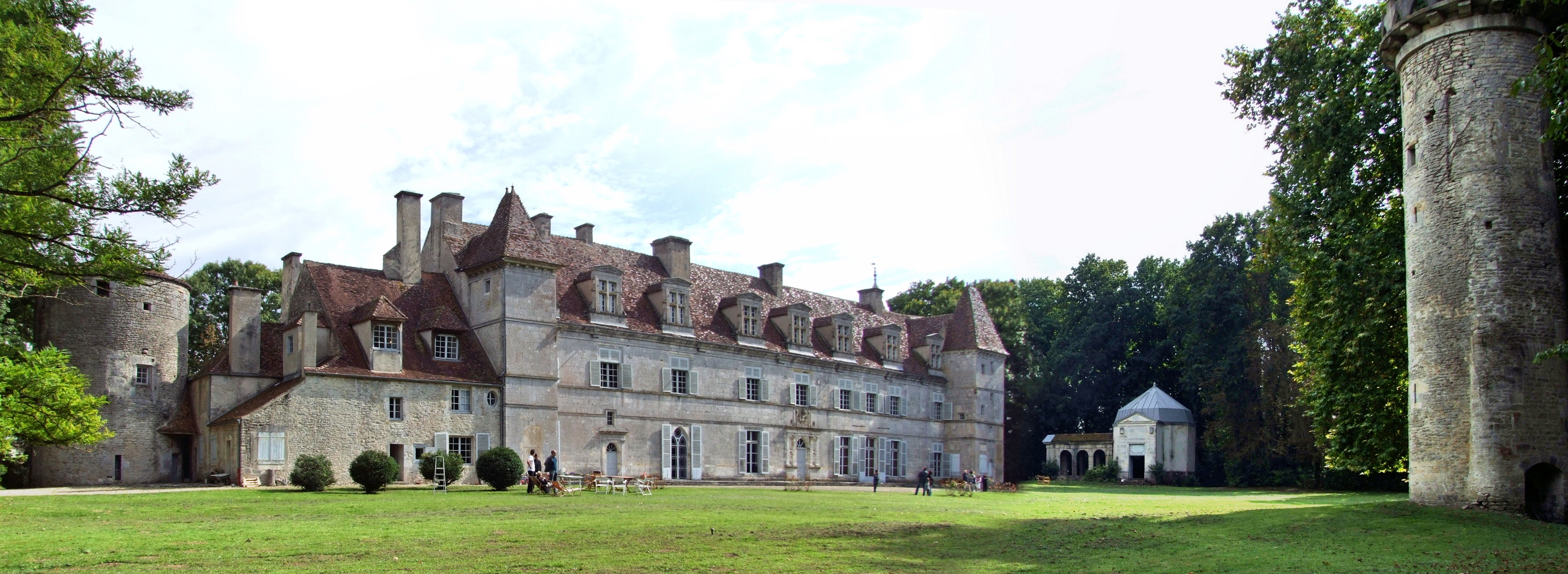 Château de Lux, Lux, Côte-d'Or, Bourgogne, FRANCE